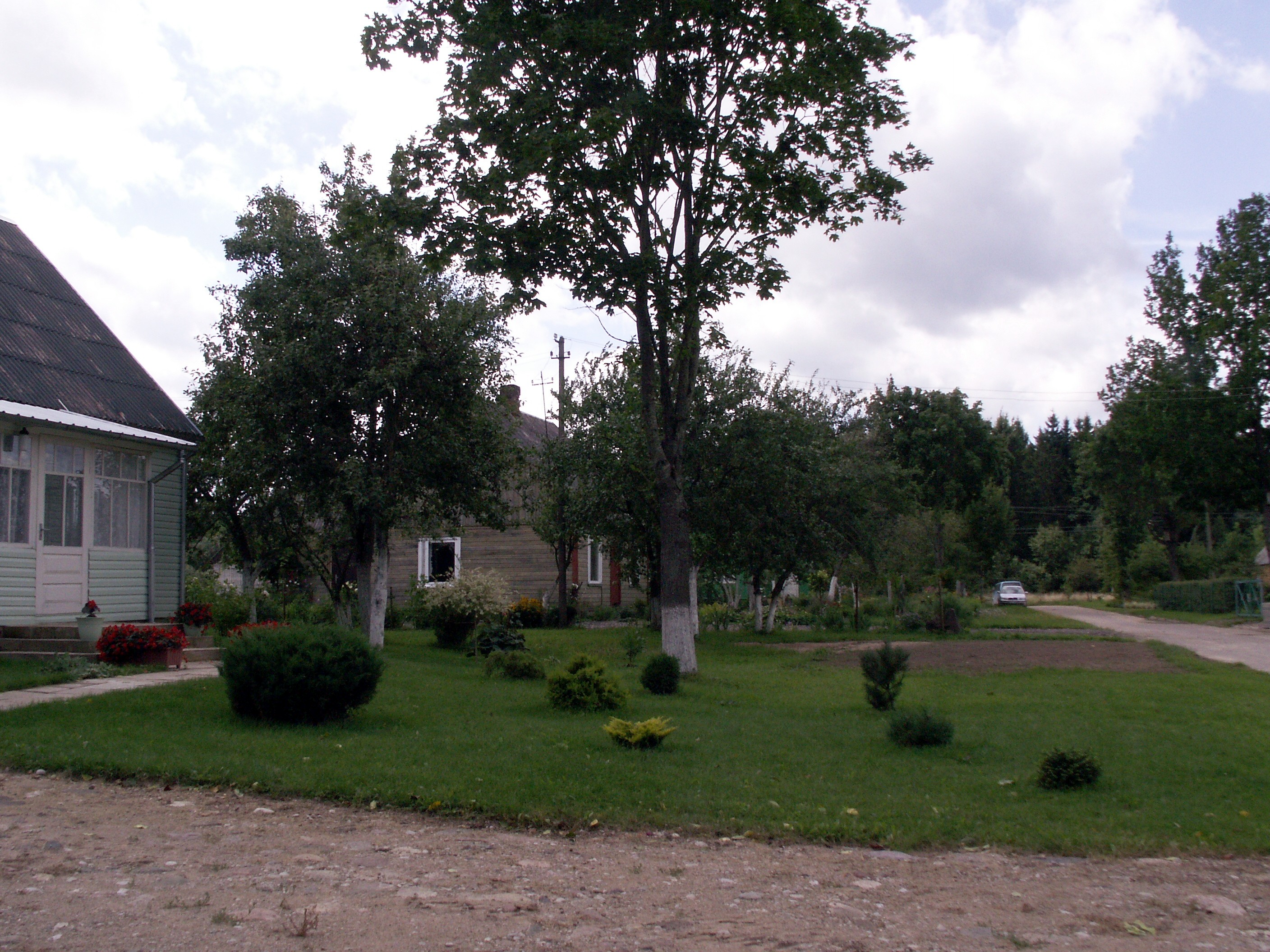 Dirvonėnai, Šiaulių rajonas